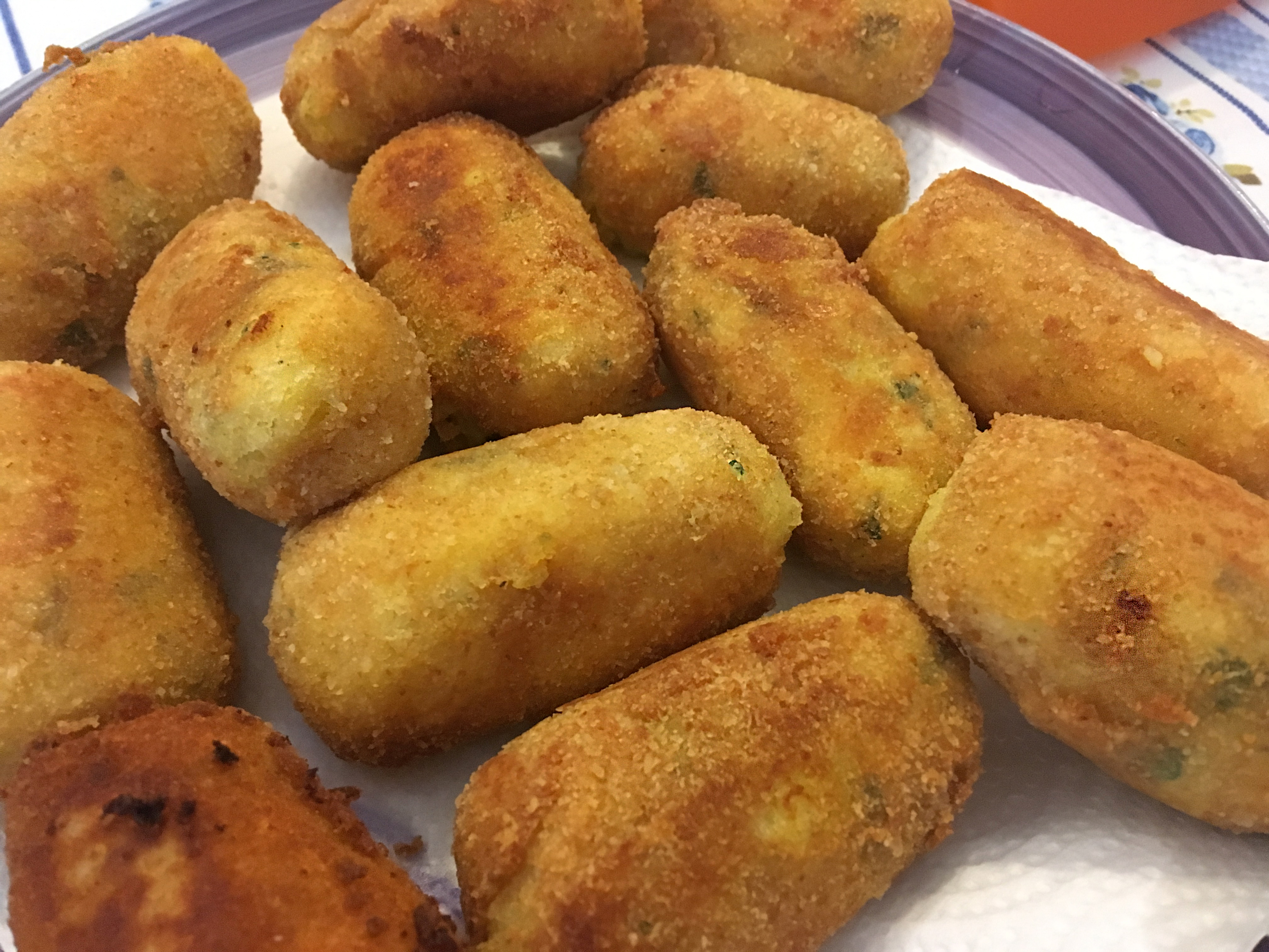 i Crocchè a Napoli conosciuti meglio come "panzarotti "